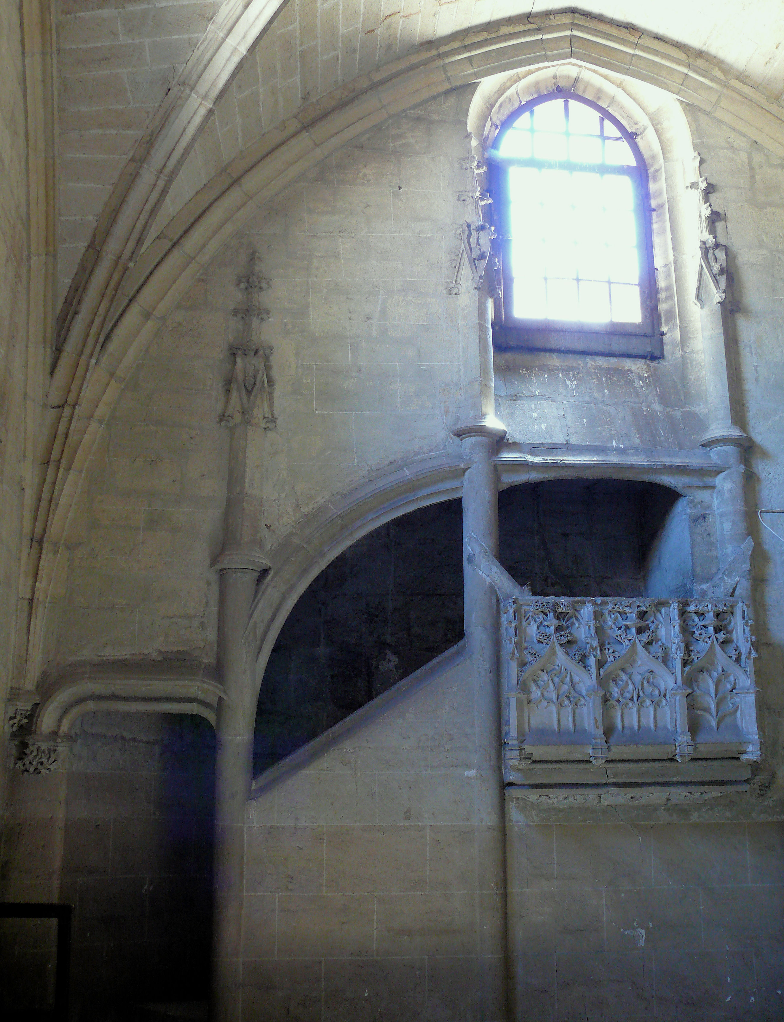 Villefranche-de-Rouergue - Chartreuse Saint-Sauveur- Réfectoire : chaire du lecteur